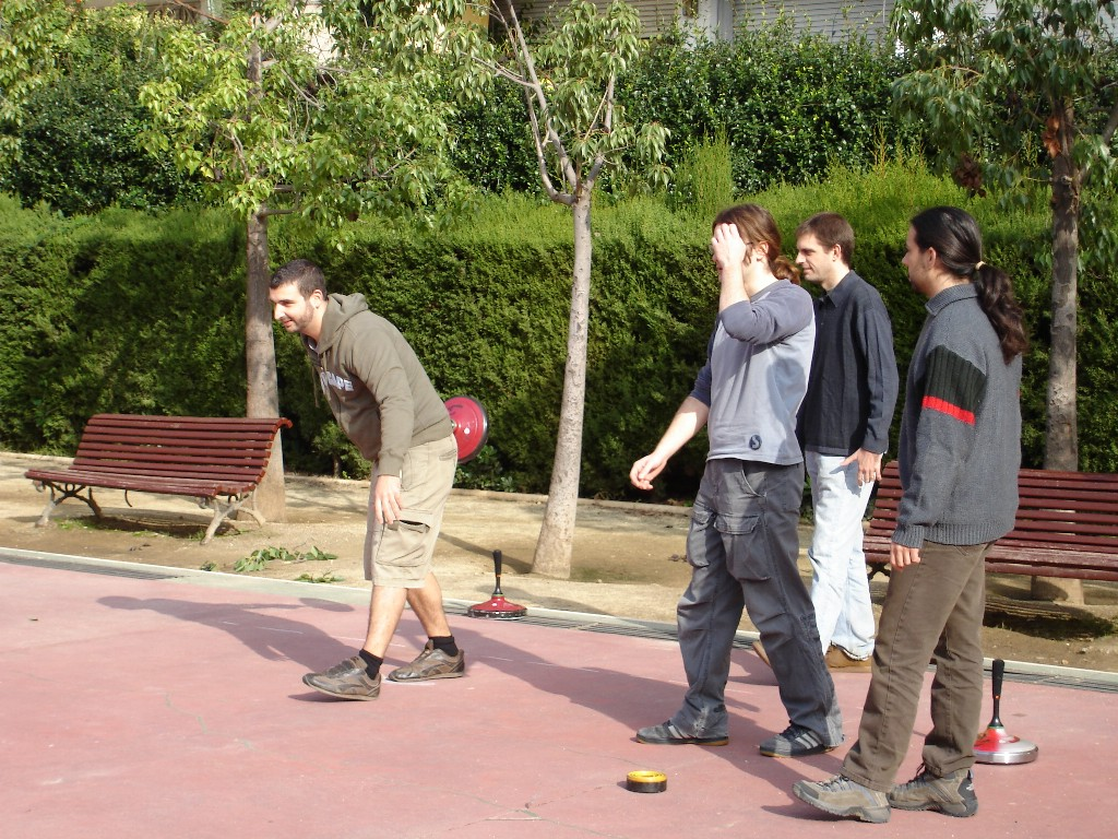 Associació Icestock Catalunya